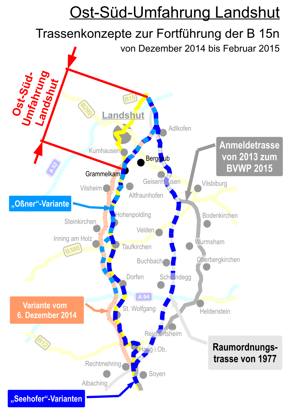 In der Öffentlichkeit zwischen Dezember 2014 und März 2015 diskutierte Trassenvarianten der B 15n mit Ost-Süd-Umfahrung Landshuts